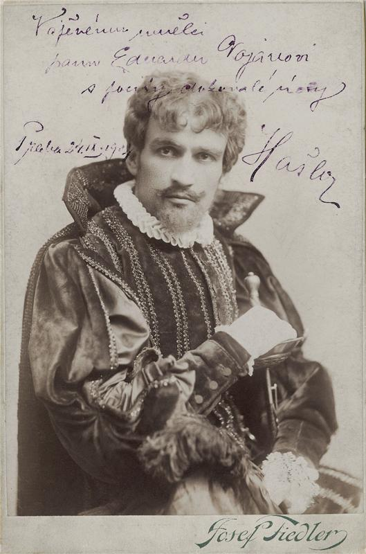 Fotografie Karla Hašlera z Národního divadla, s věnováním Eduardu Vojanovi